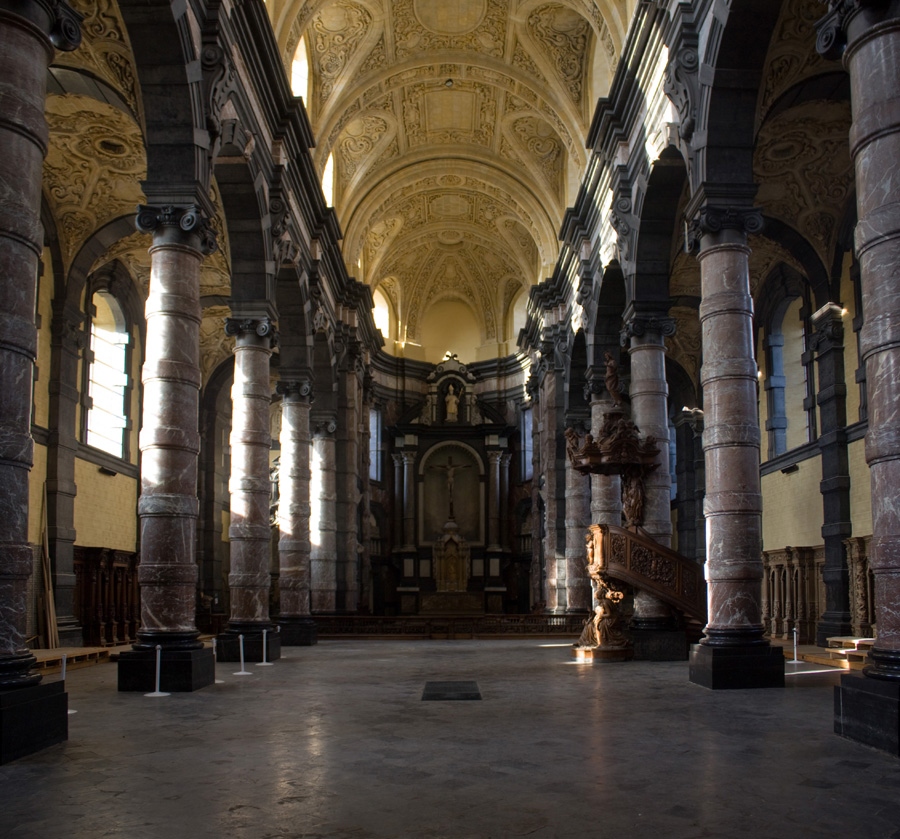 Kerk Saint-Loup, Namen